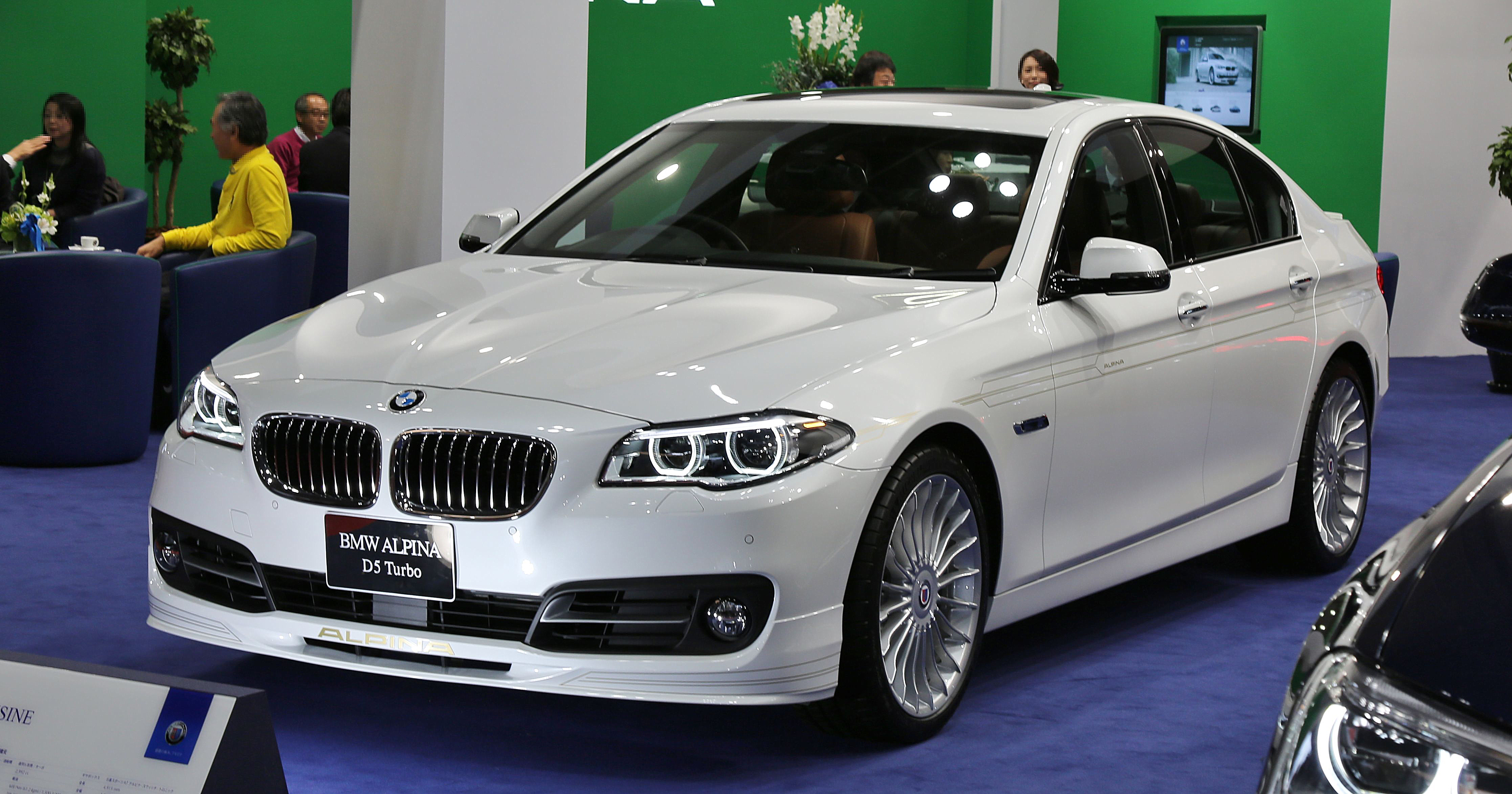 Alpina D5 Turbo